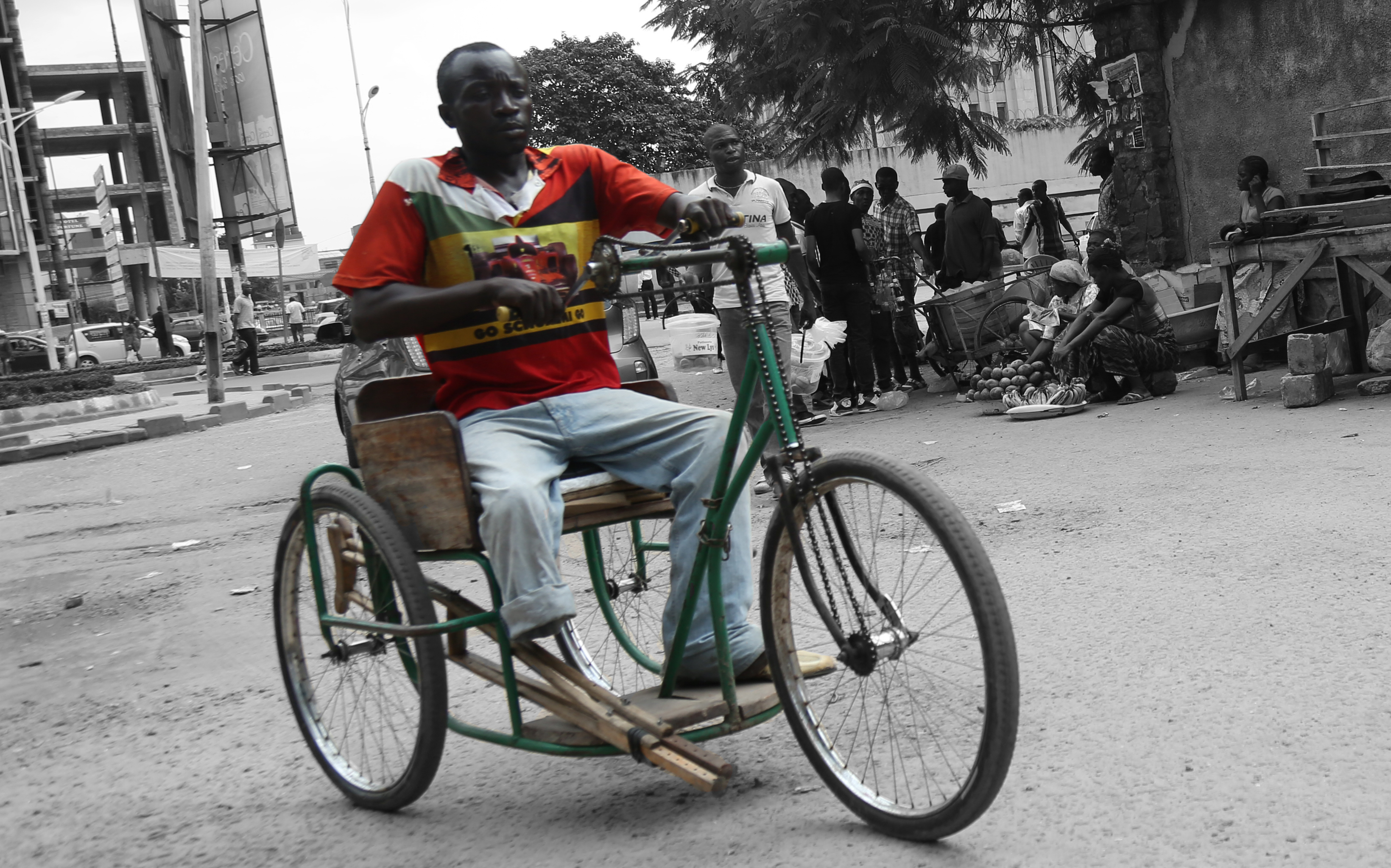 Des Femmes, Des Hommes, Des Enfants et Des handicapé qui travaille dure dans la misère juste pour avoir de quoi manger subvenir a leur besoin et de nourrir leurs enfants .. This is an image of Cultural Fashion or Adornment from Democratic Republic of the Congo